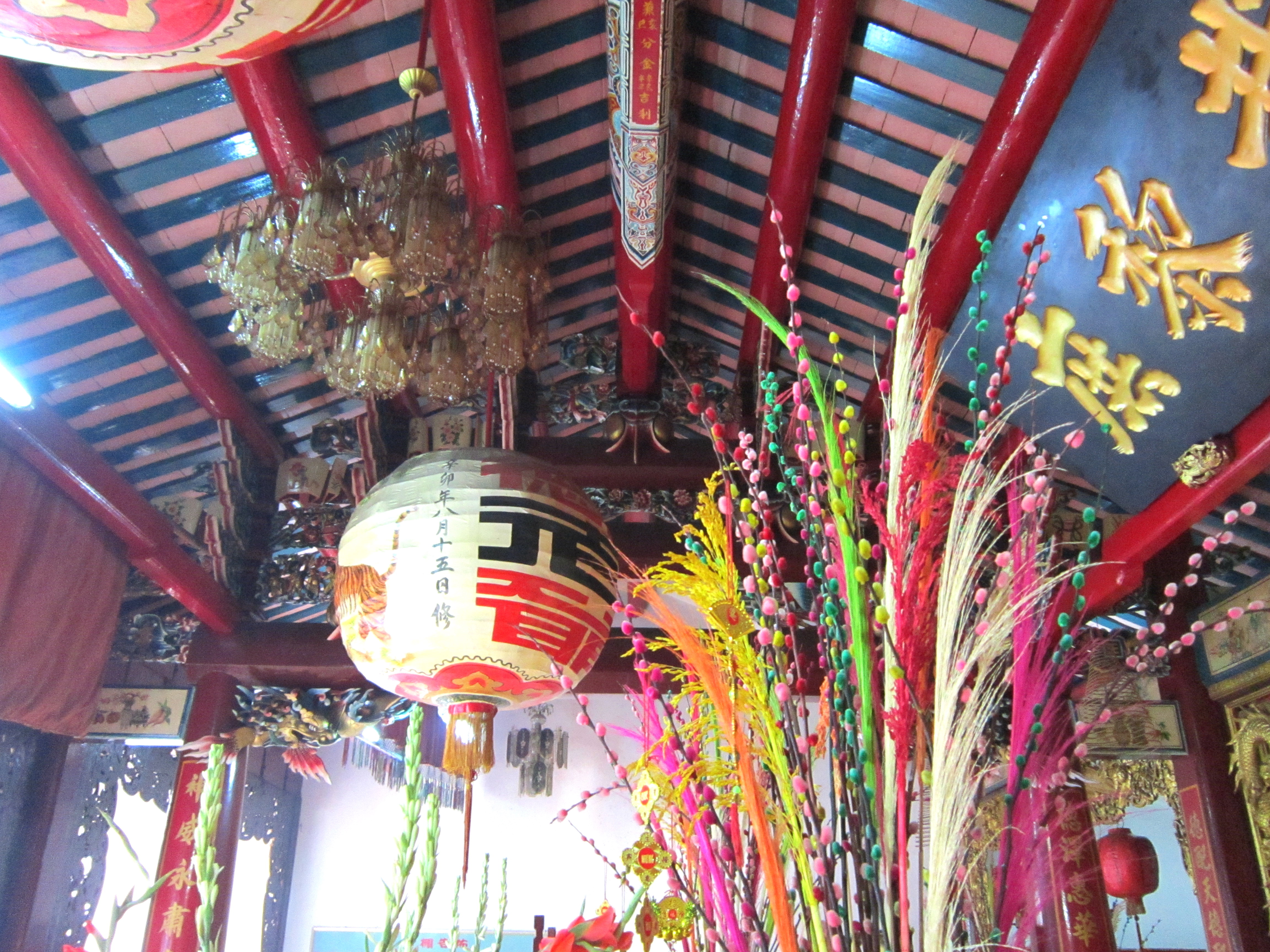 Kết cấu gỗ trong chùa Bang, hiện tọa lạc tại số 74 đường Điện Biên Phủ, thuộc phường 3, thành phố Bạc Liêu, tỉnh Bạc Liêu, Việt Nam.